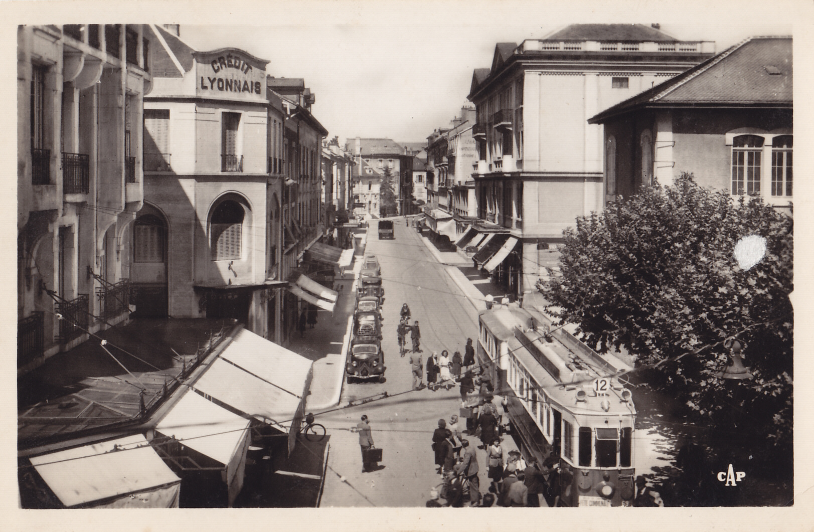 Carte postale semi-moderne éditée par CAP, n°8 :ANNEMASSE - Rue de la Gare